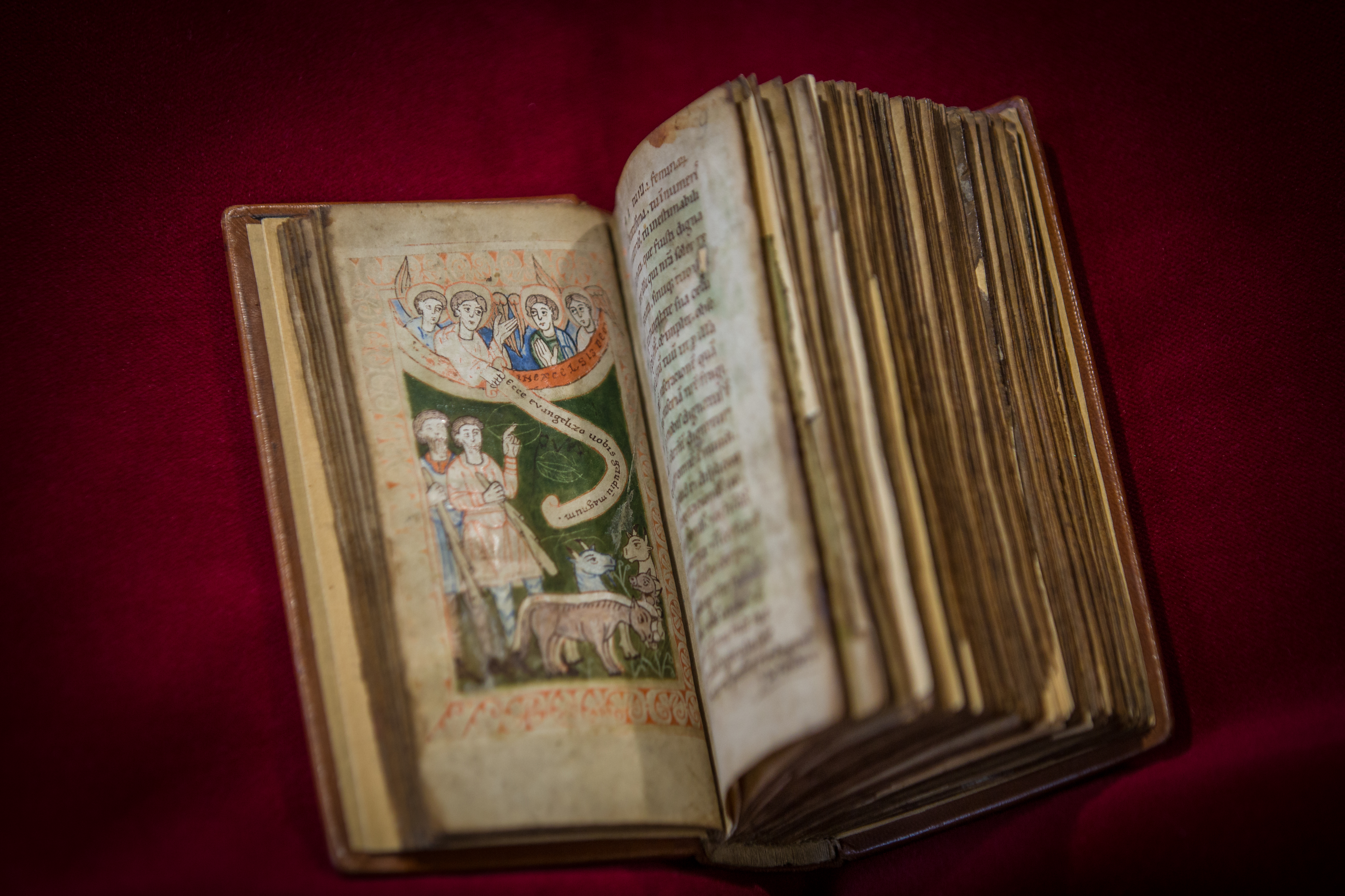 Liber Precum (livre de prières), XIIème s, parchemin, écriture minuscule caroline. Coll. Bibliothèque humaniste de Sélestat 21 janvier 2014.